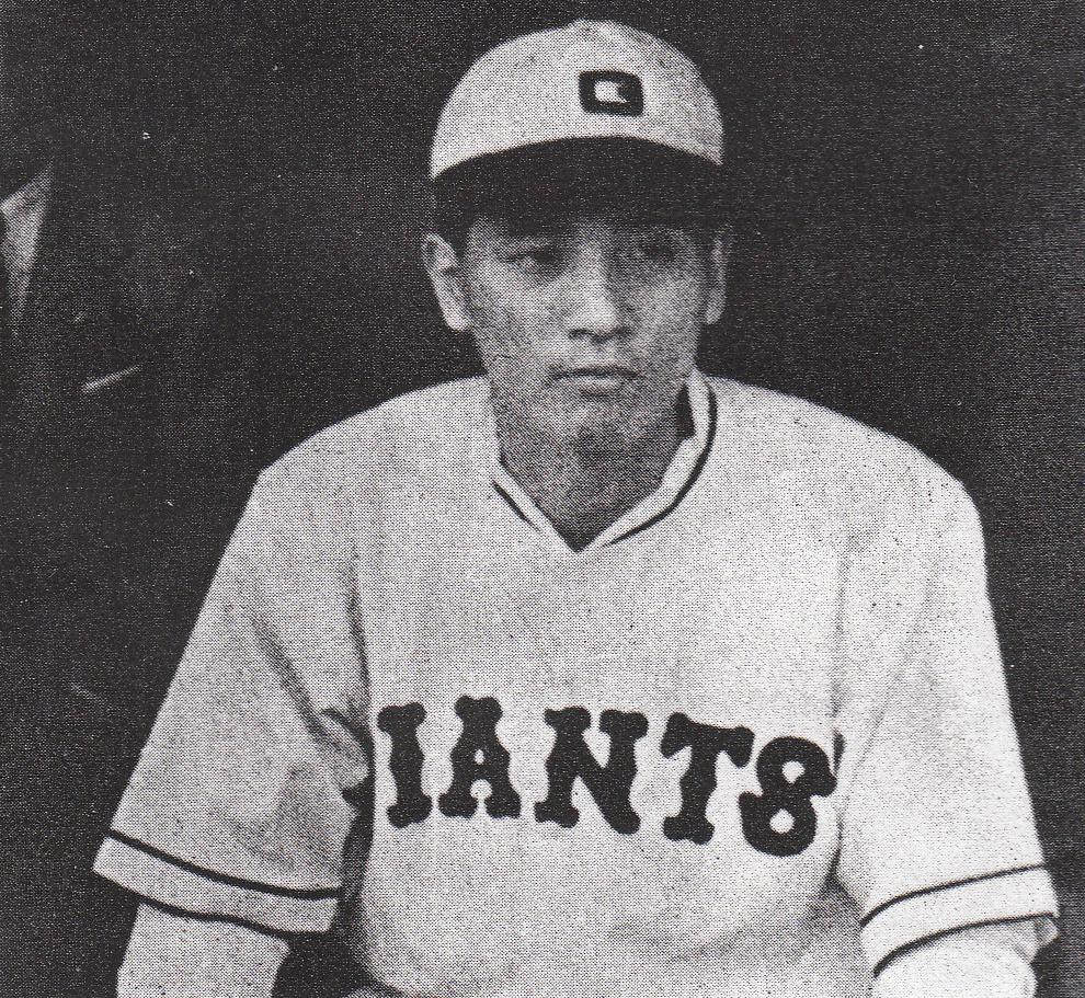 1938年頃の、三原脩（年代は、『プロ野球ユニフォーム物語』を参考に記述）。